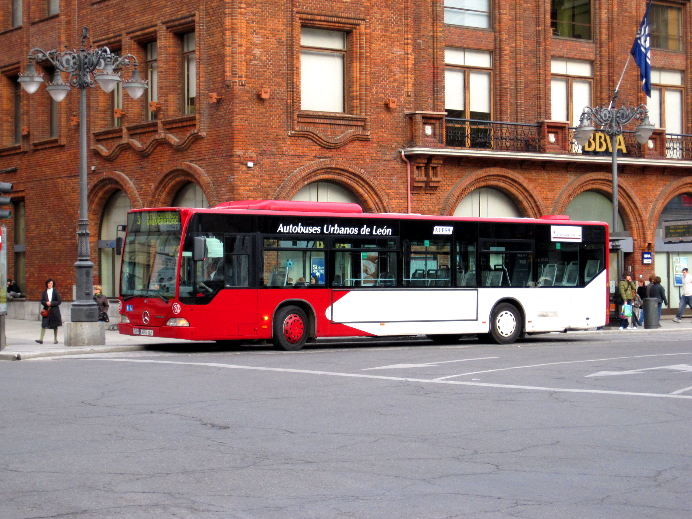 Vista de uno de los autobuses urbanos de León (España).